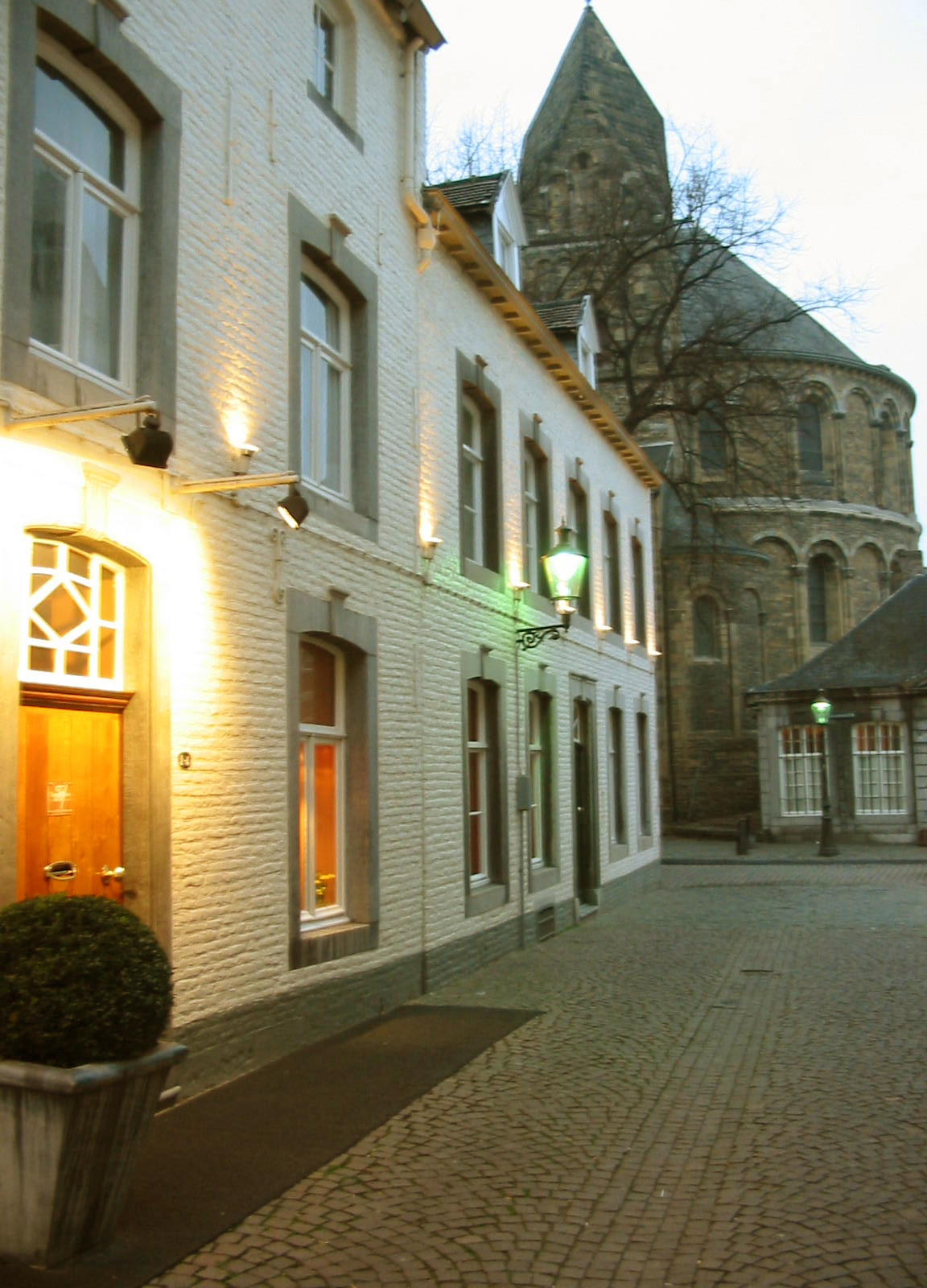 restaurant Toine Hermsen, gevel met de Onze Lieve Vrouwe-basiliek